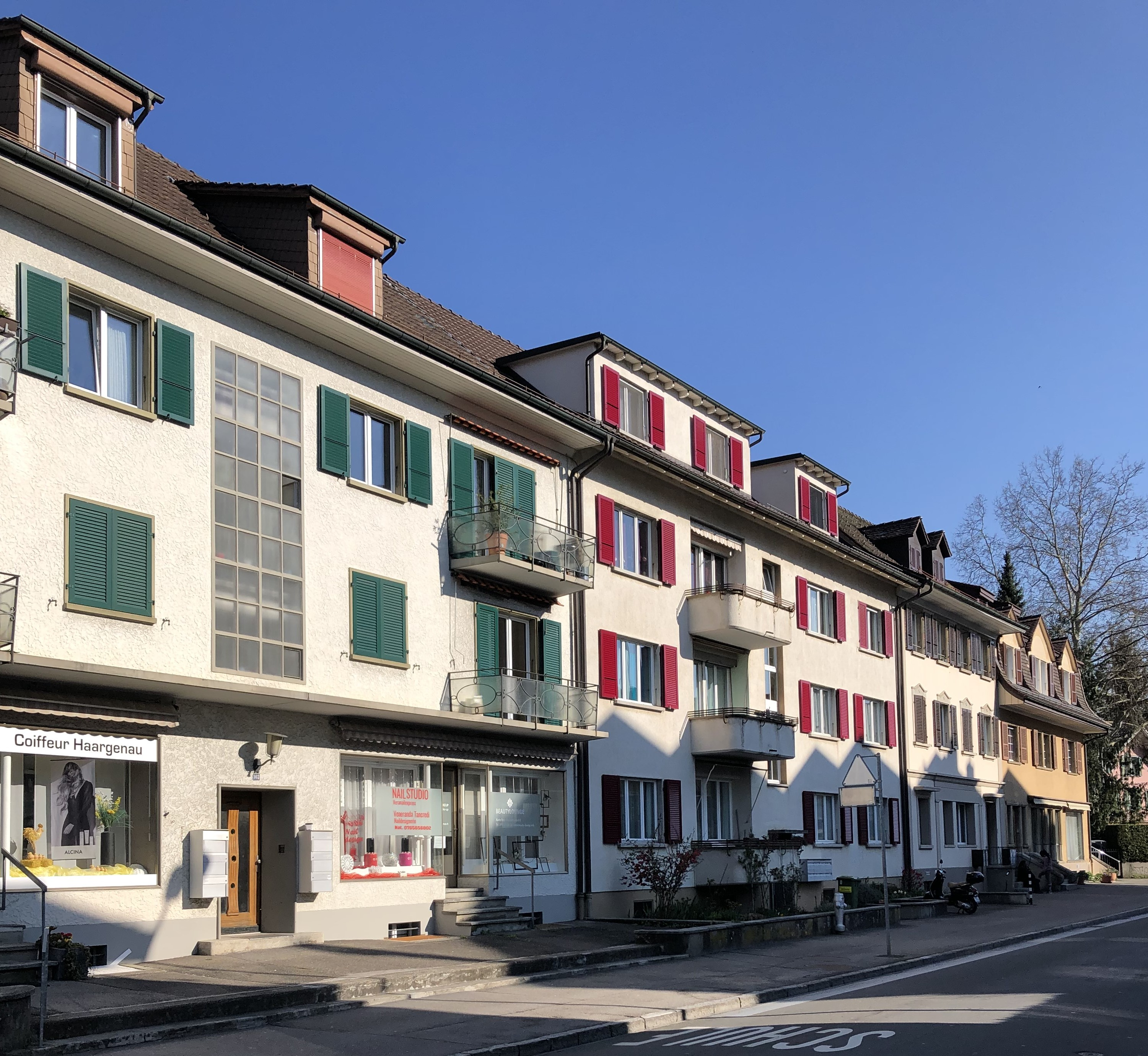 Bümplizdorf Bebauung Siedlung